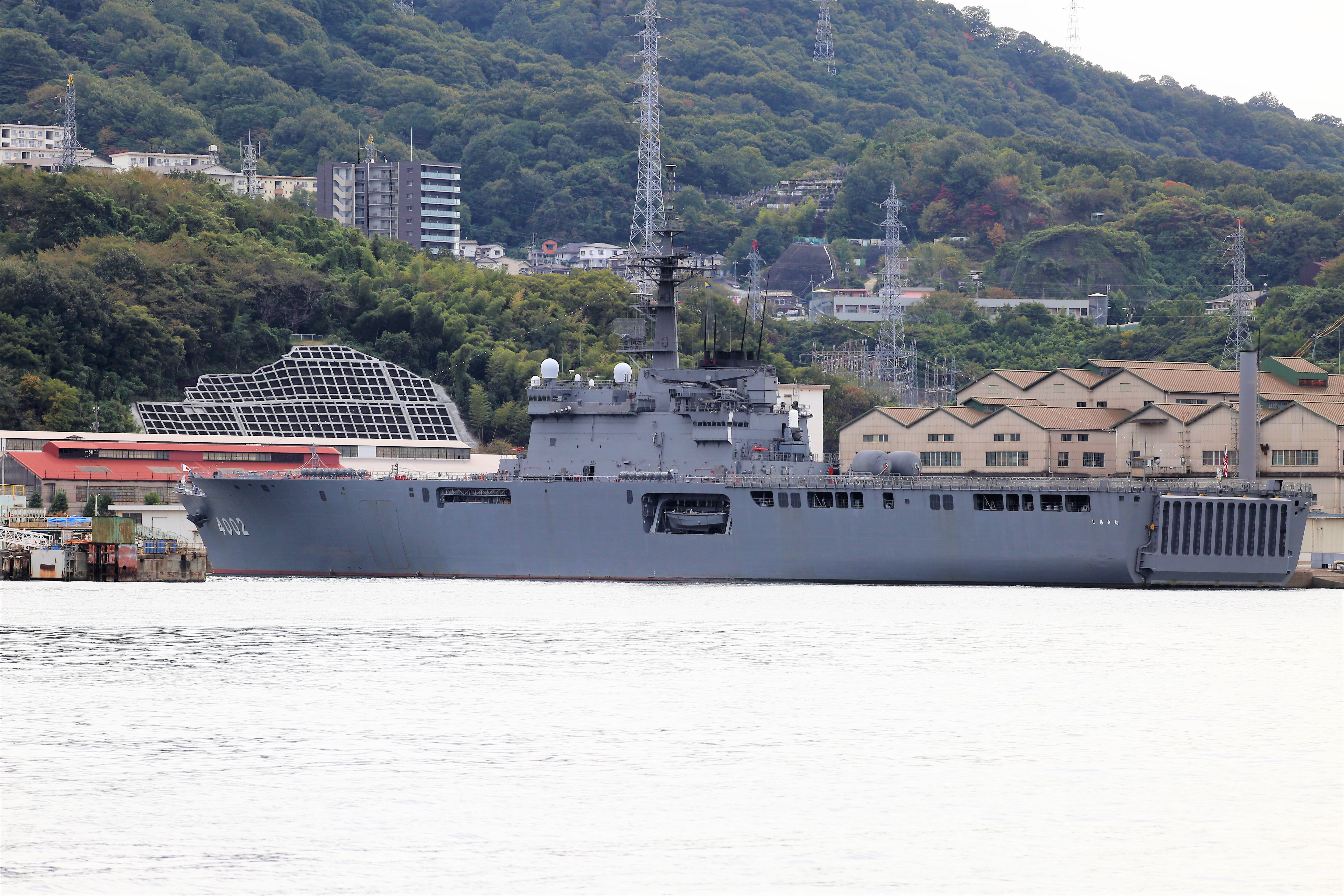 海上自衛隊の輸送艦「しもきた」。2019年海上自衛隊呉基地で撮影。